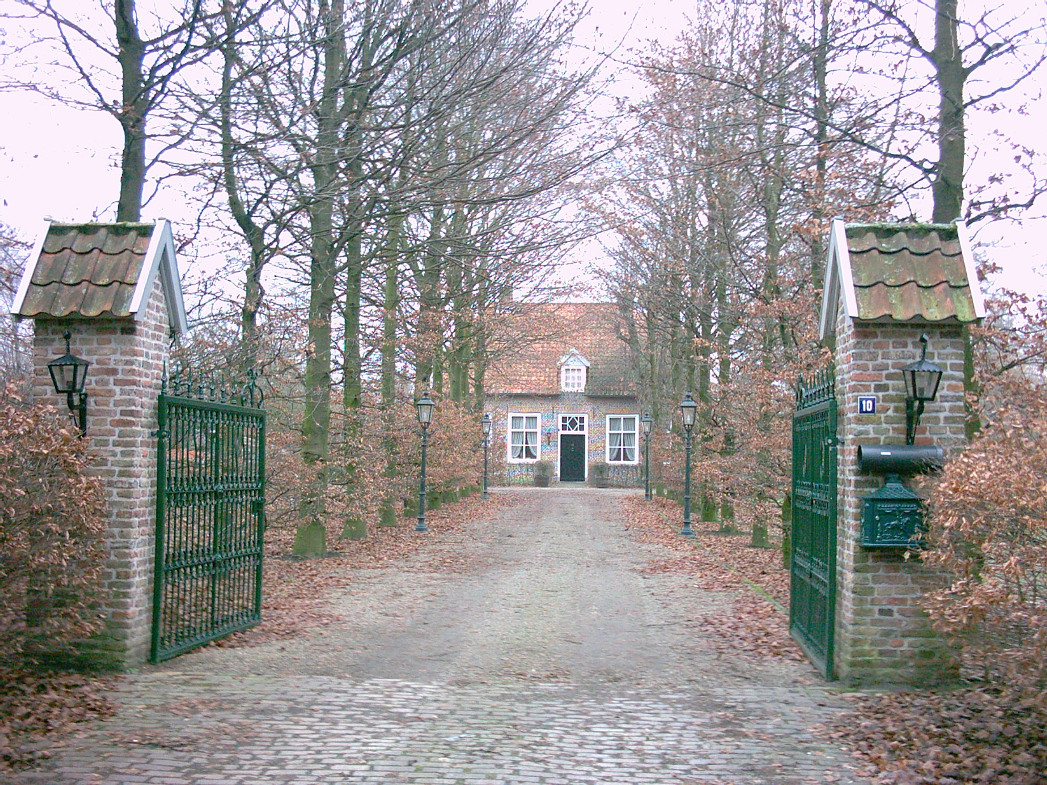 Het oudste stenen huis van Lieshout, gebouwd tussen 1719 en 1725 door Jan Bout, op dat moment heer van Lieshout